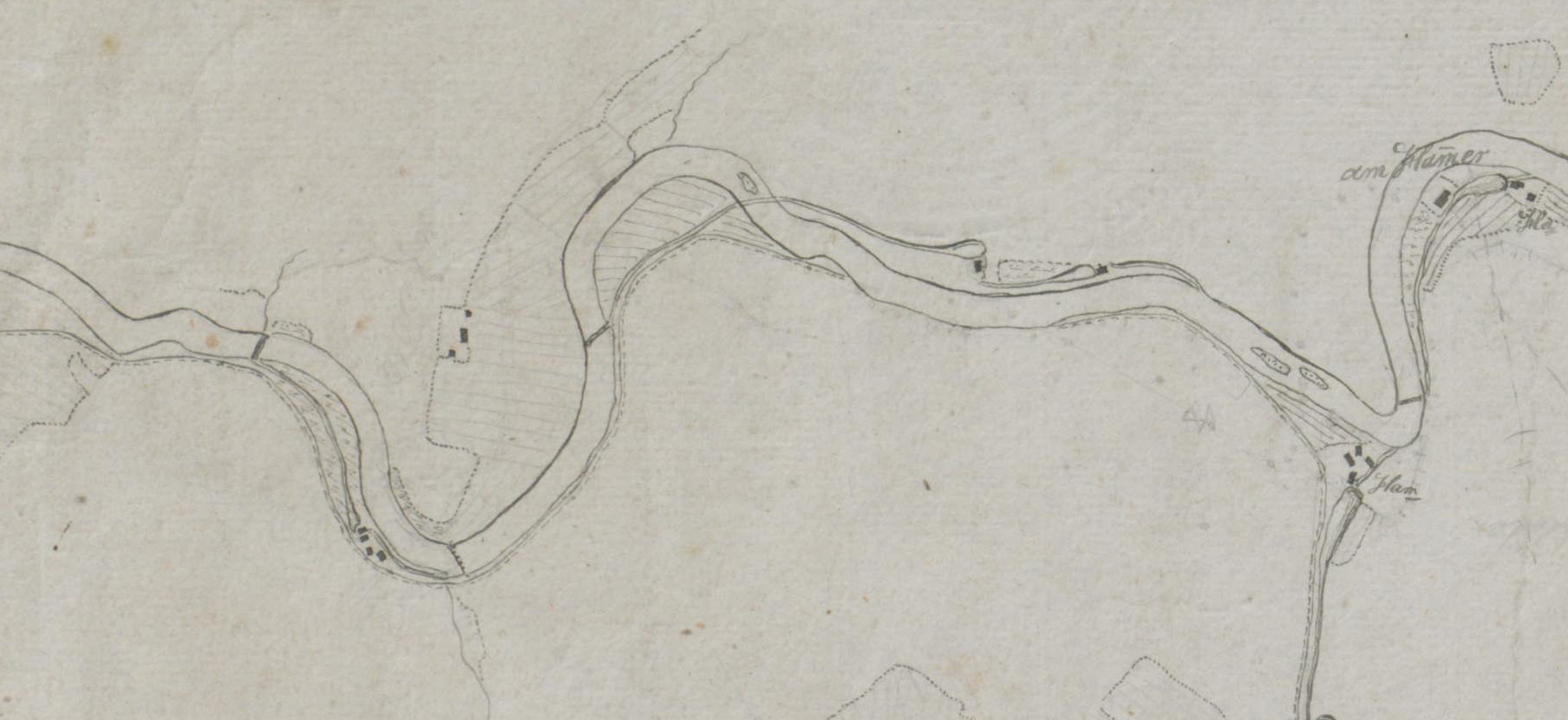 Handrisse (Mensalblätter) zur Karte der Grafschaft Mark von Eversmann um 1795 Ausschnitt Stephansohl, Nöllenhammer